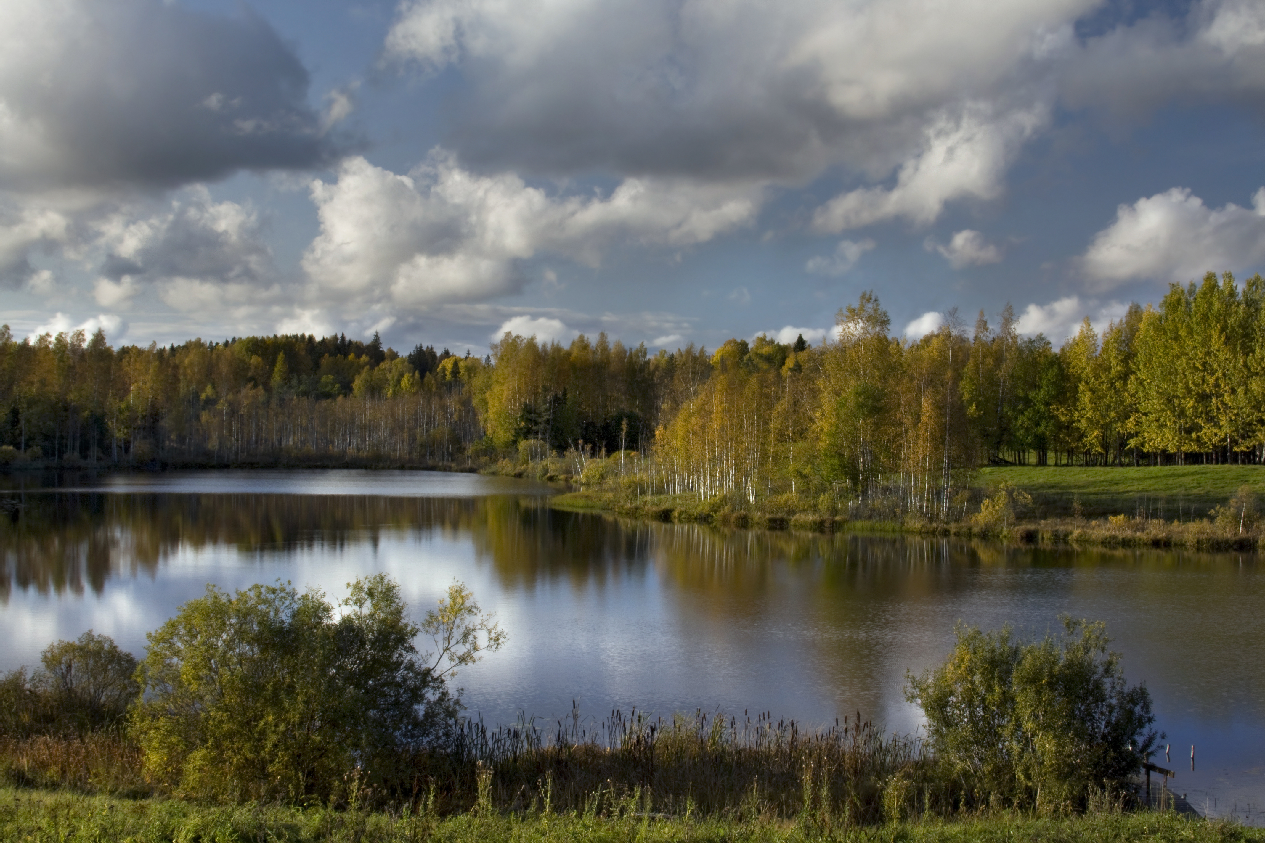 Supluskohaga Palujüri järv